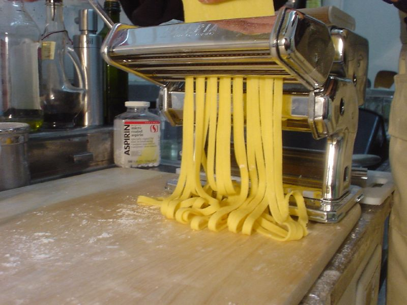 Pasta making machine